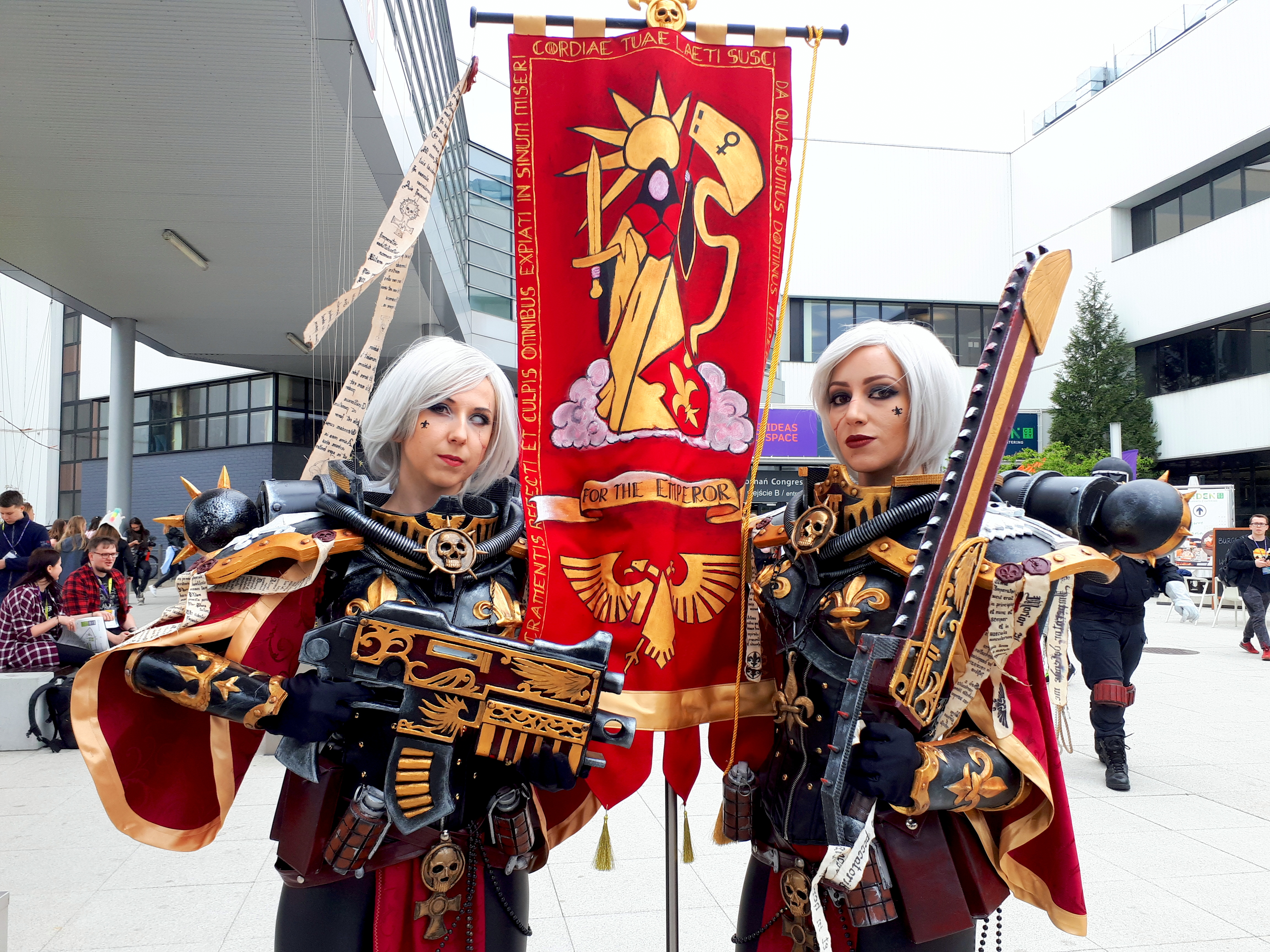 Uczestniczki konwentu Pyrkon 2019 - cosplay Adepta Sororitas (Siostry Bitwy)